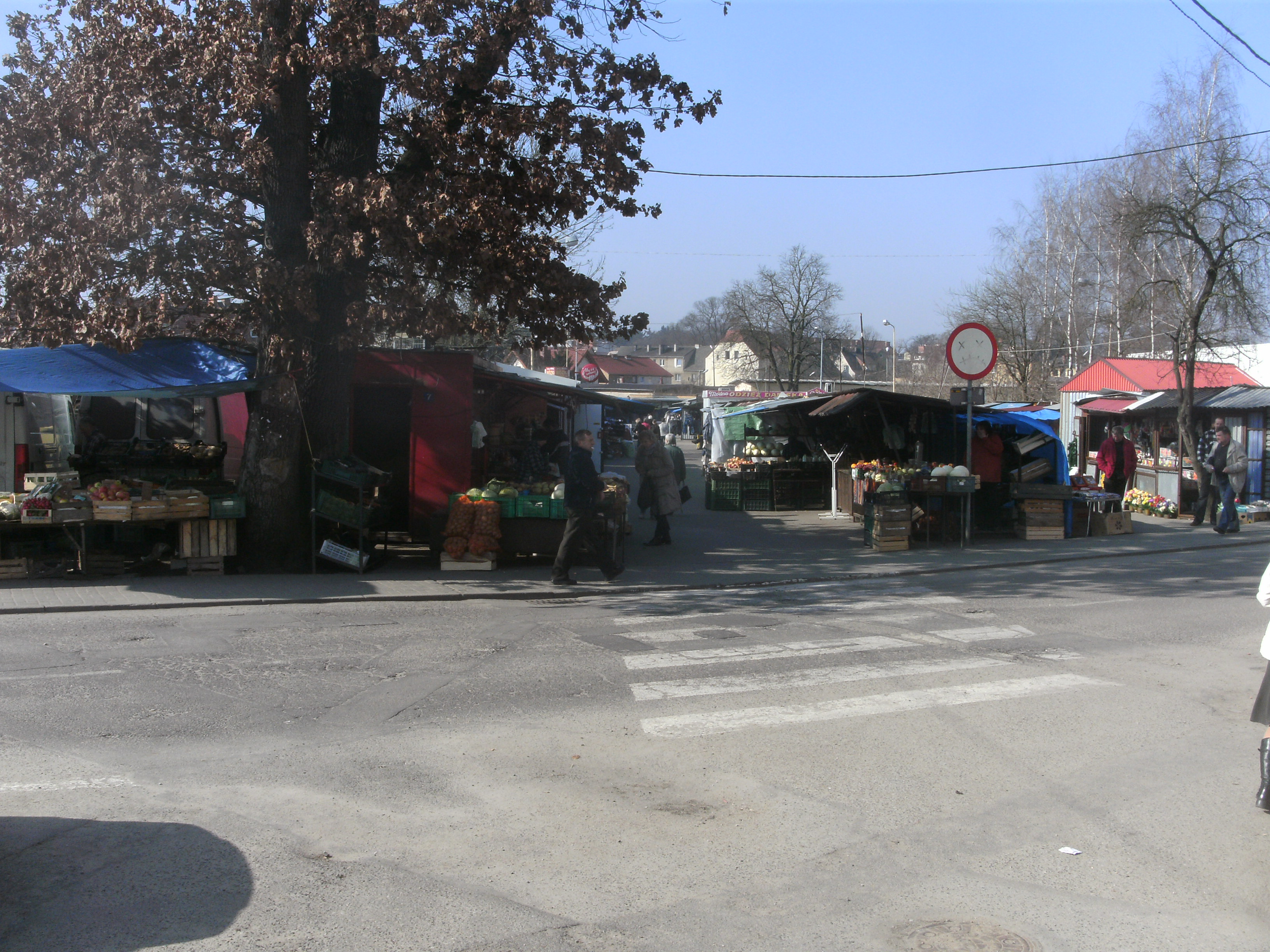 Gollnow, Wochenmarkt an der Ihna